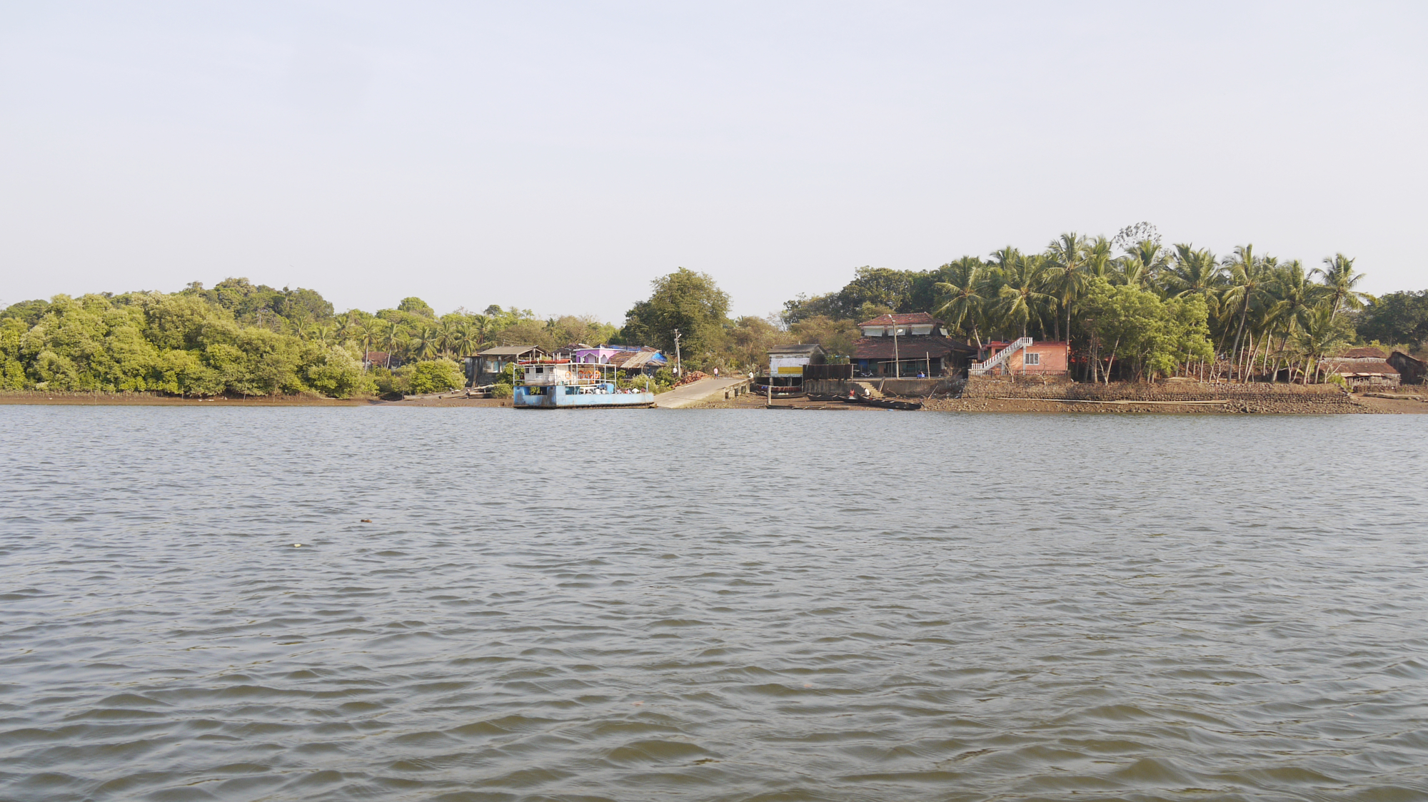 ... river Zuari near Cortalim